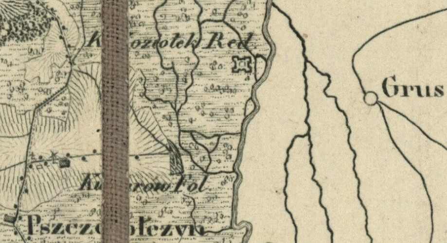 Topograficzna karta Królestwa Polskiego z późniejszymi zmianami. Reduta obronna "Koziołek" powstała ok. 1656 r. za sprawą Pawła Jana Sapiehy w czasie oblężenia przez Szwedów zamku w Tykocinie. Blokowała transport rzeczny lub uniemożliwiała przeprawę pod Kurowem wrogim flotom.